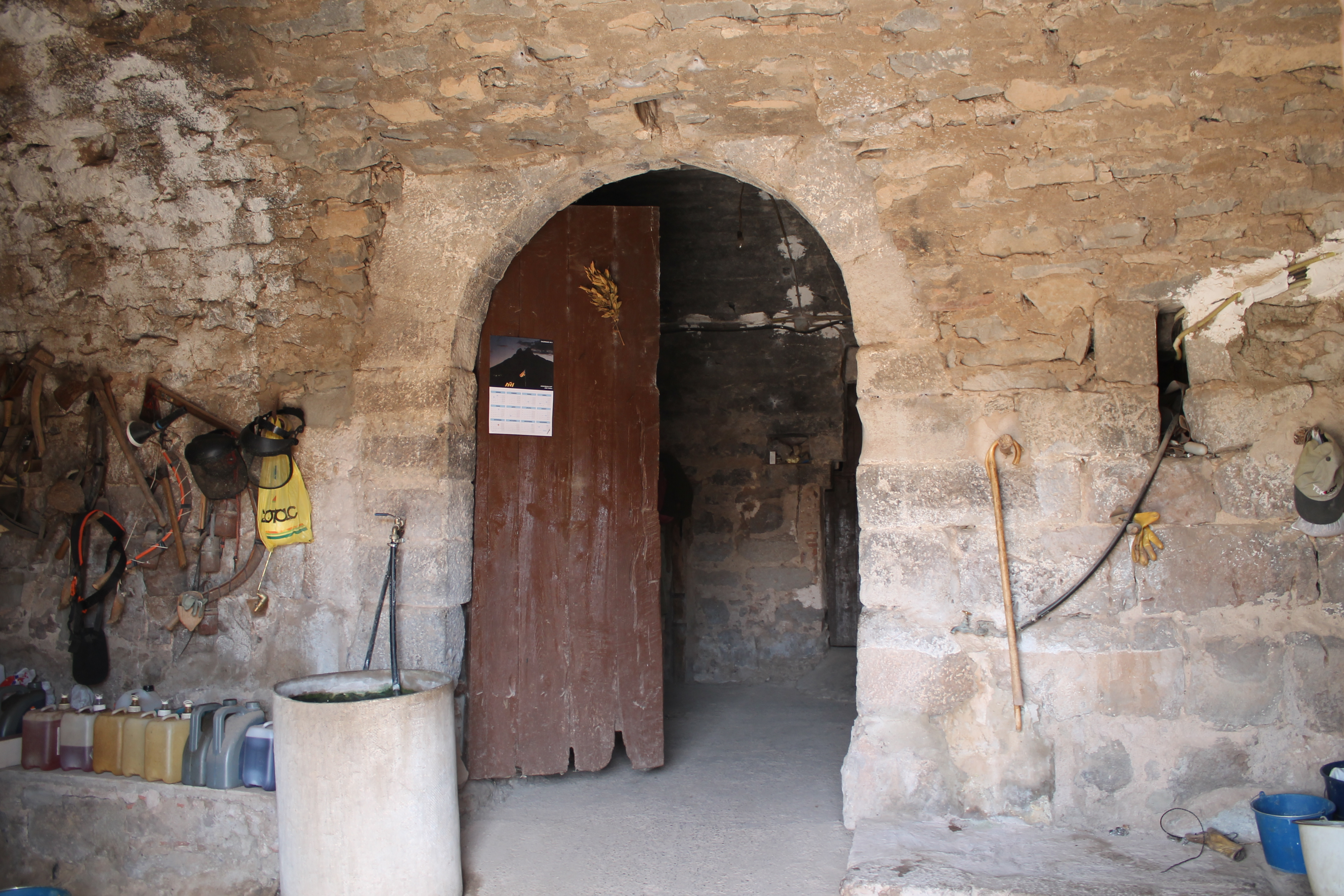 Detall a l'interior de l'entrada de cal Feliu.